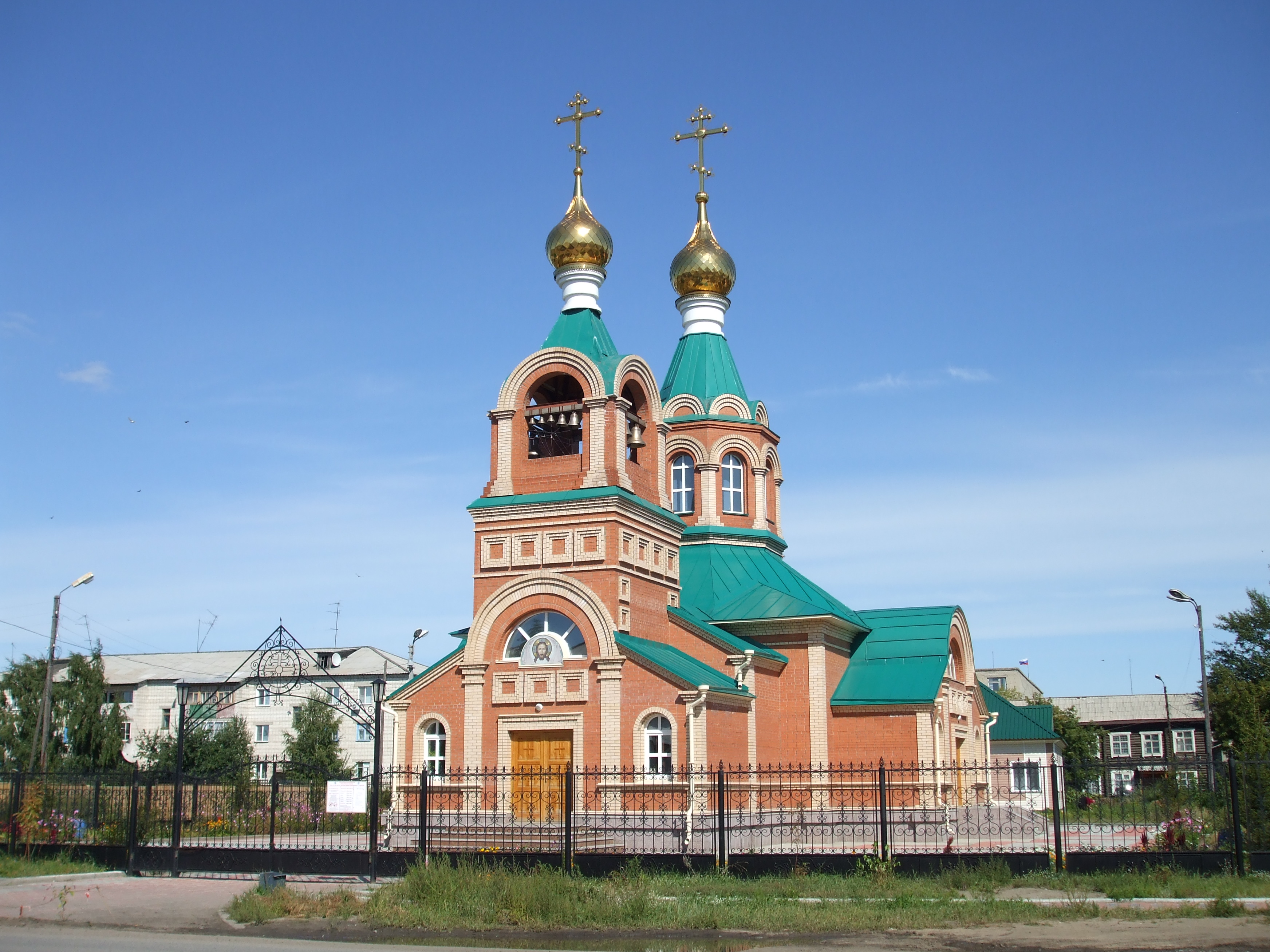 Храм Андрея Первозванного в Карасуке Новосибирской области